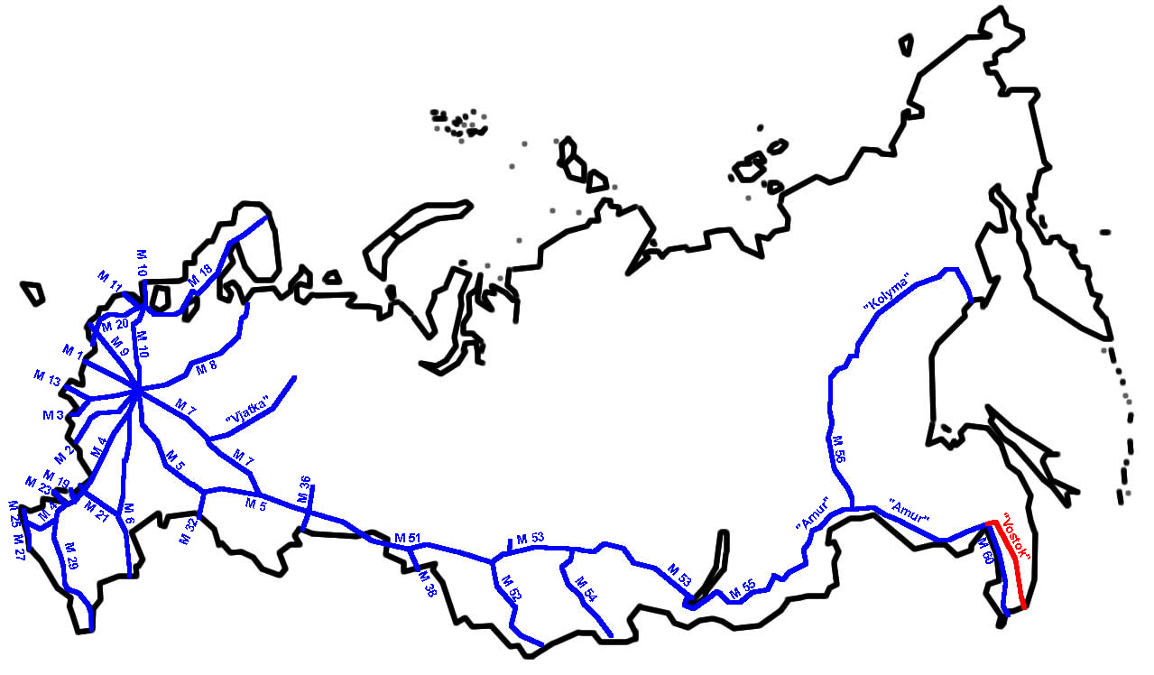 Magistrale "Vostok" im russischen Fernstraßennetz